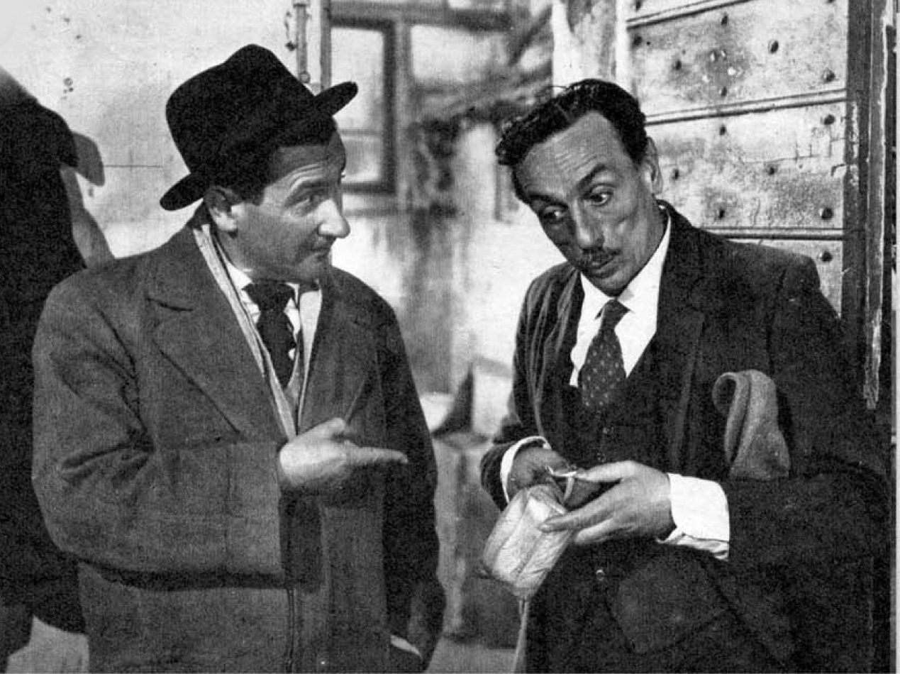 Paolo Stoppa ed Eduardo de Filippo nell'episodio "Avarizia ed Ira" del Film "I sette peccati capitali" (1952)